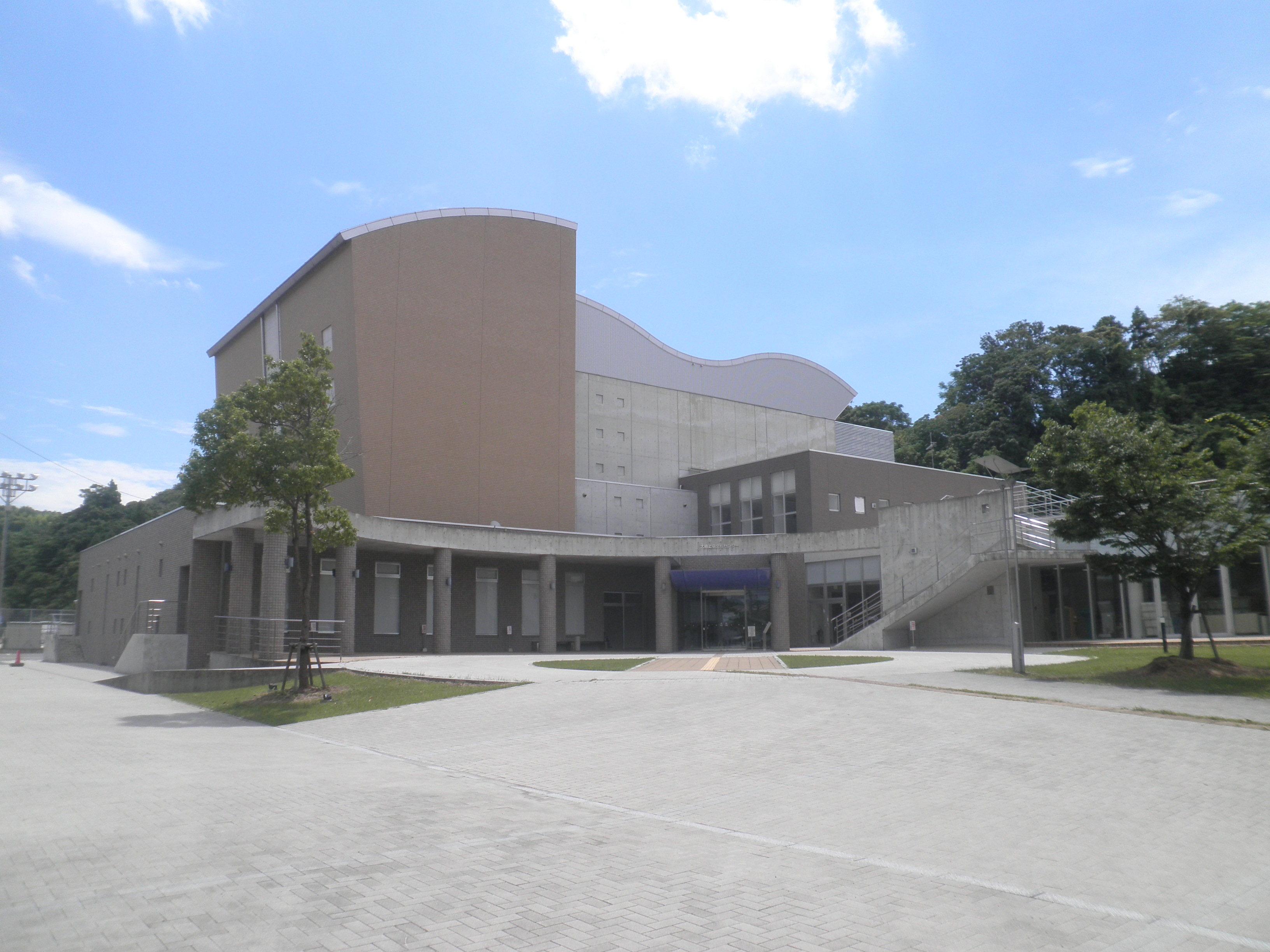 広島県の大崎上島、大崎上島文化センター